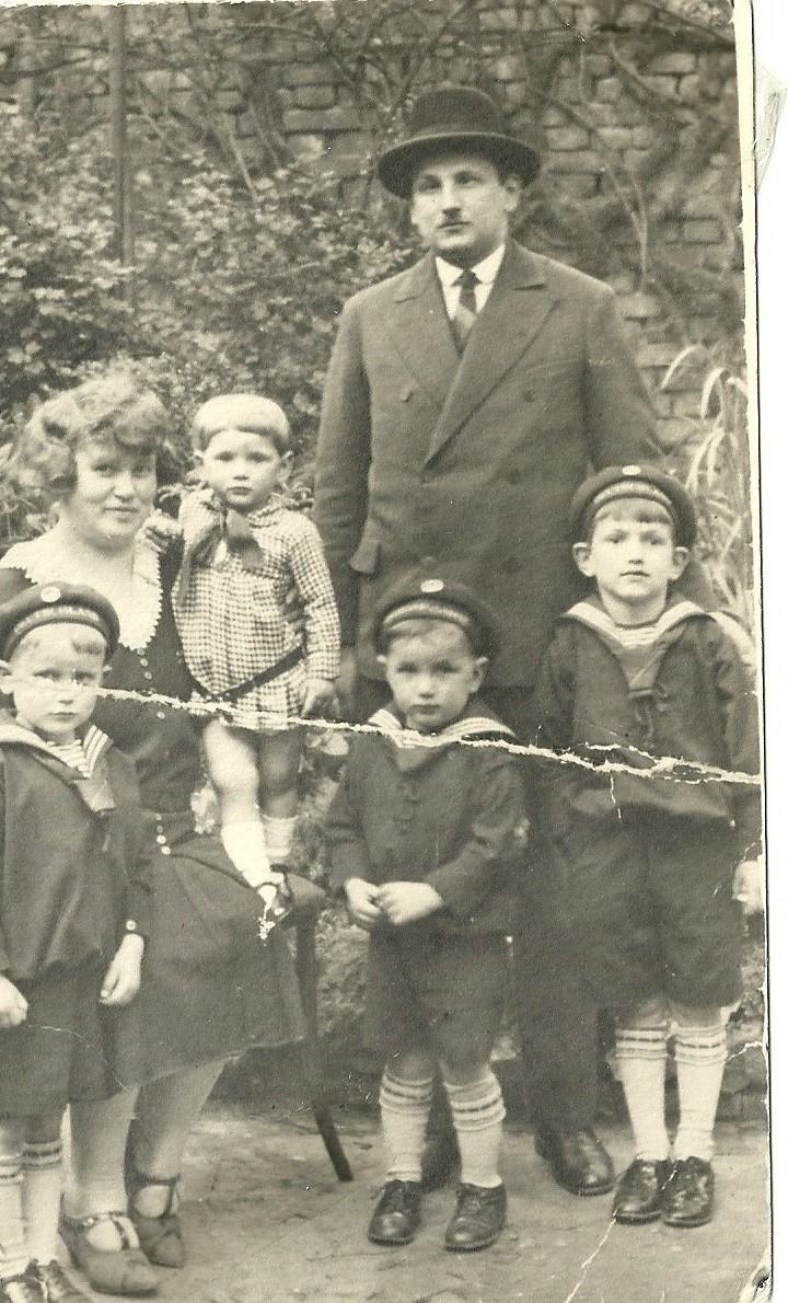 אברהם ורוזה פרסטר וילדיהם:דוד, יהודה, יעקב ומלכה